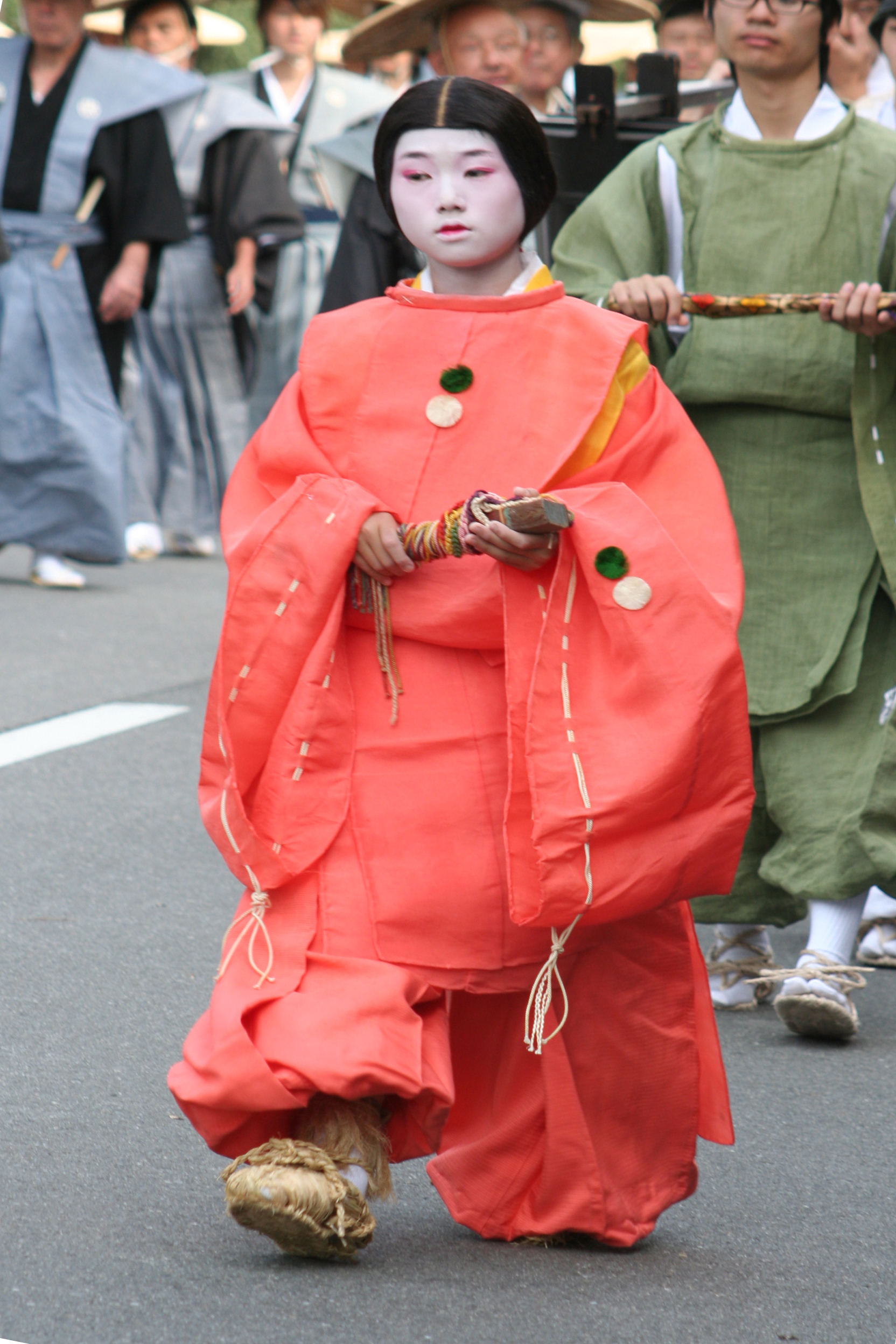 京都府京都市にて開催された時代祭。正午の御所から平安神宮までの行進の様子。2009年10月22日撮影。